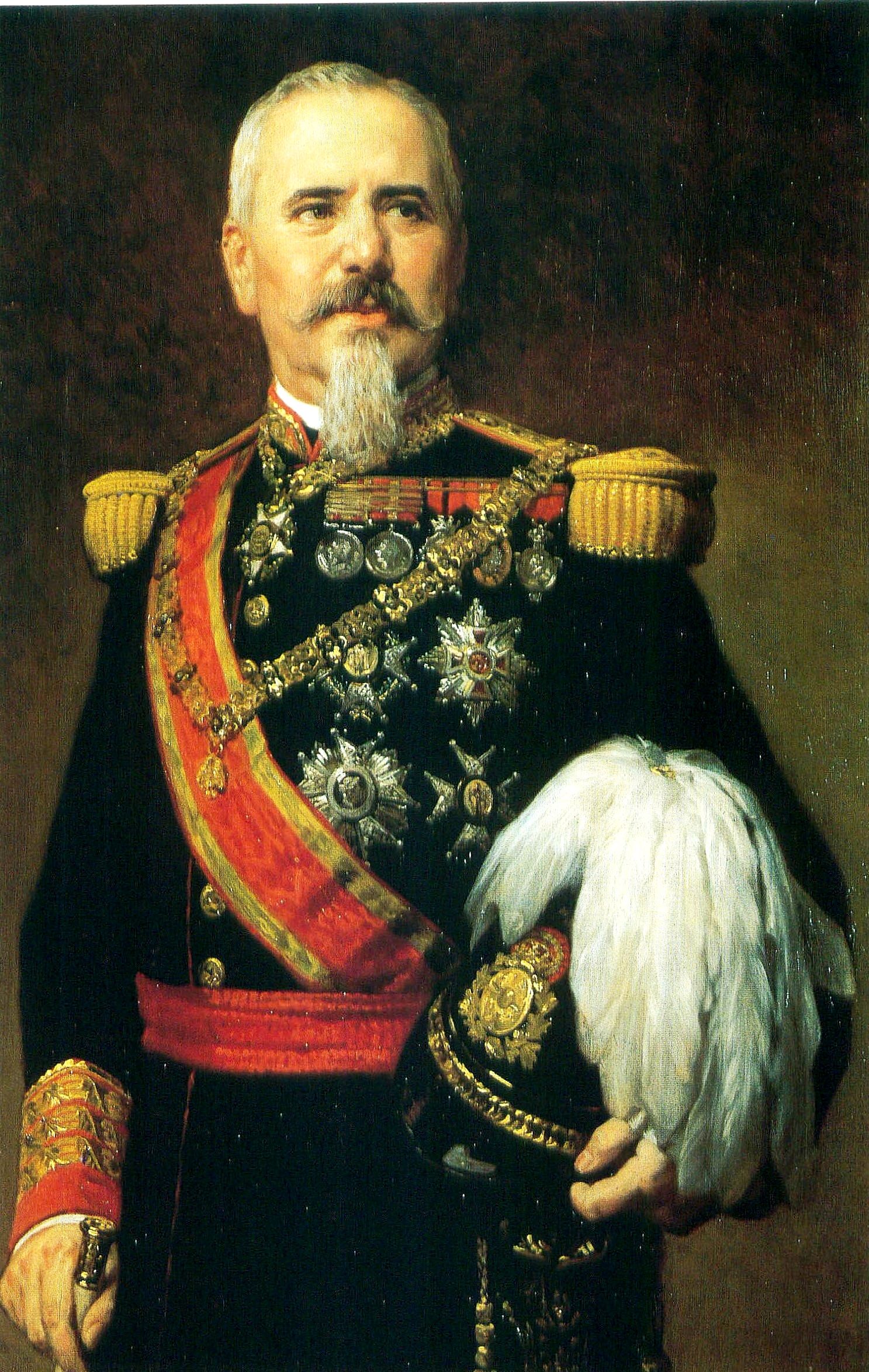 Retrato del militar y politico español Arsenio Martínez Campos (1831-1900).